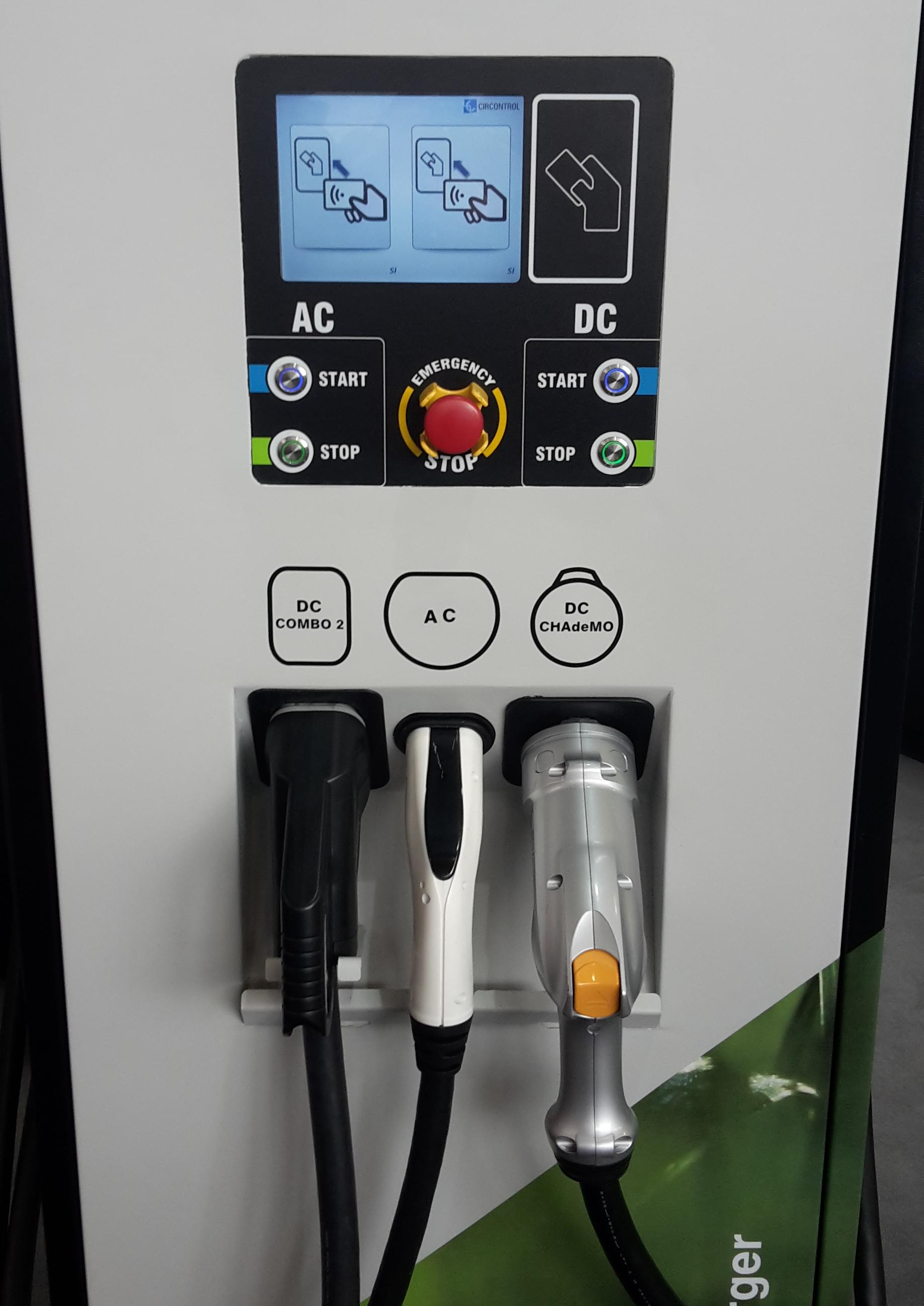 Ladesäule mit Typ-2-, Combo-2- und CCHdeMO-Anschluss aufgenommen auf der Hannovermesse 2016